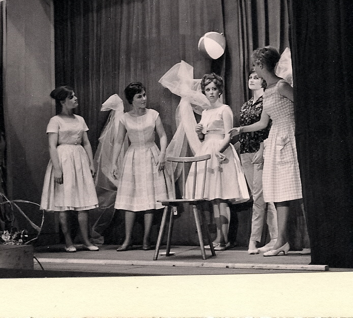 Darstellerinnen im Laienspiel Schaufenster Nr. 7 1959 in München